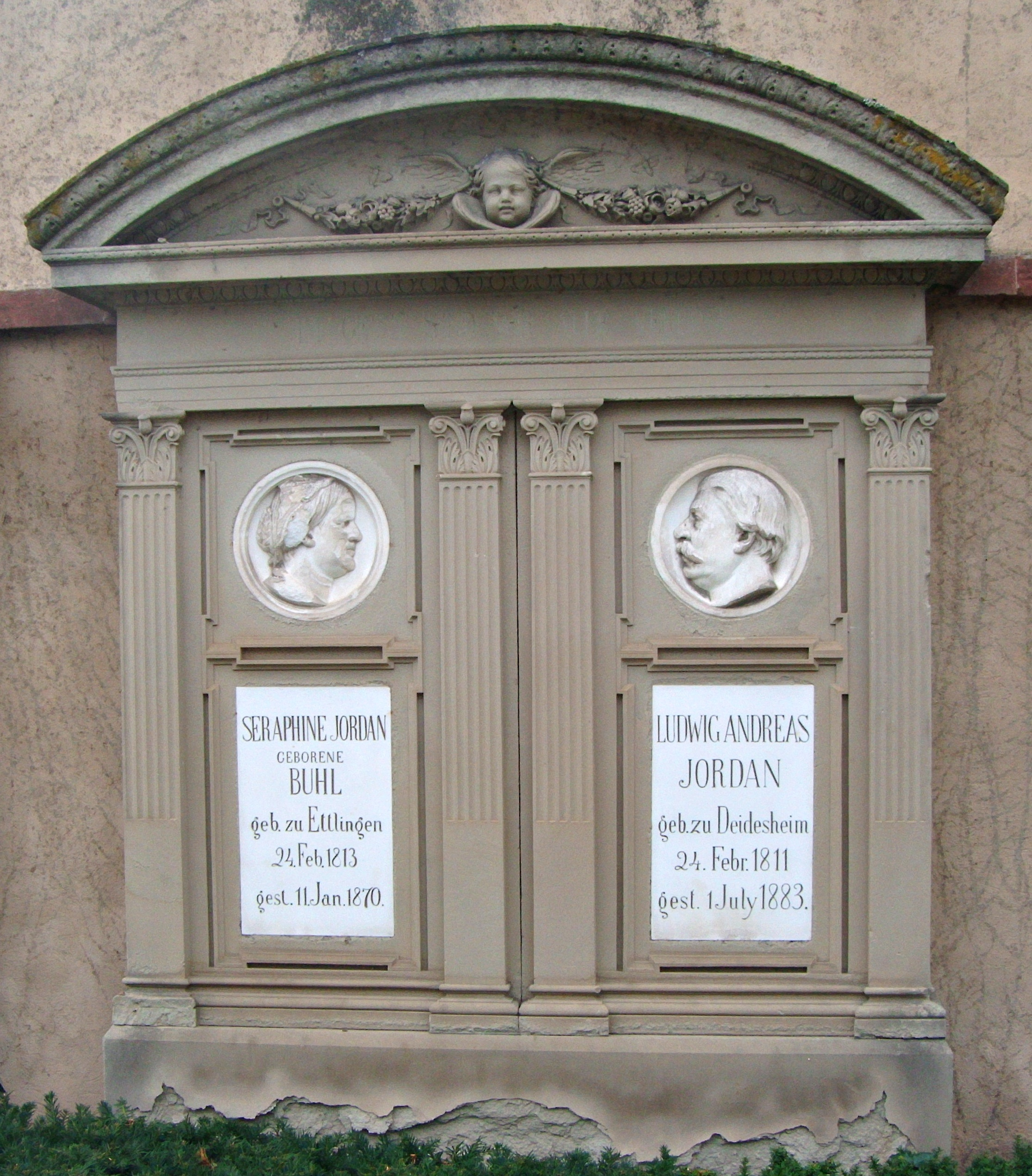 Ludwig Andreas Jordan (1811-1883), Reichstags- und bayerischer Landtagsabgeordneter, Grab auf dem Friedhof Deidesheim.